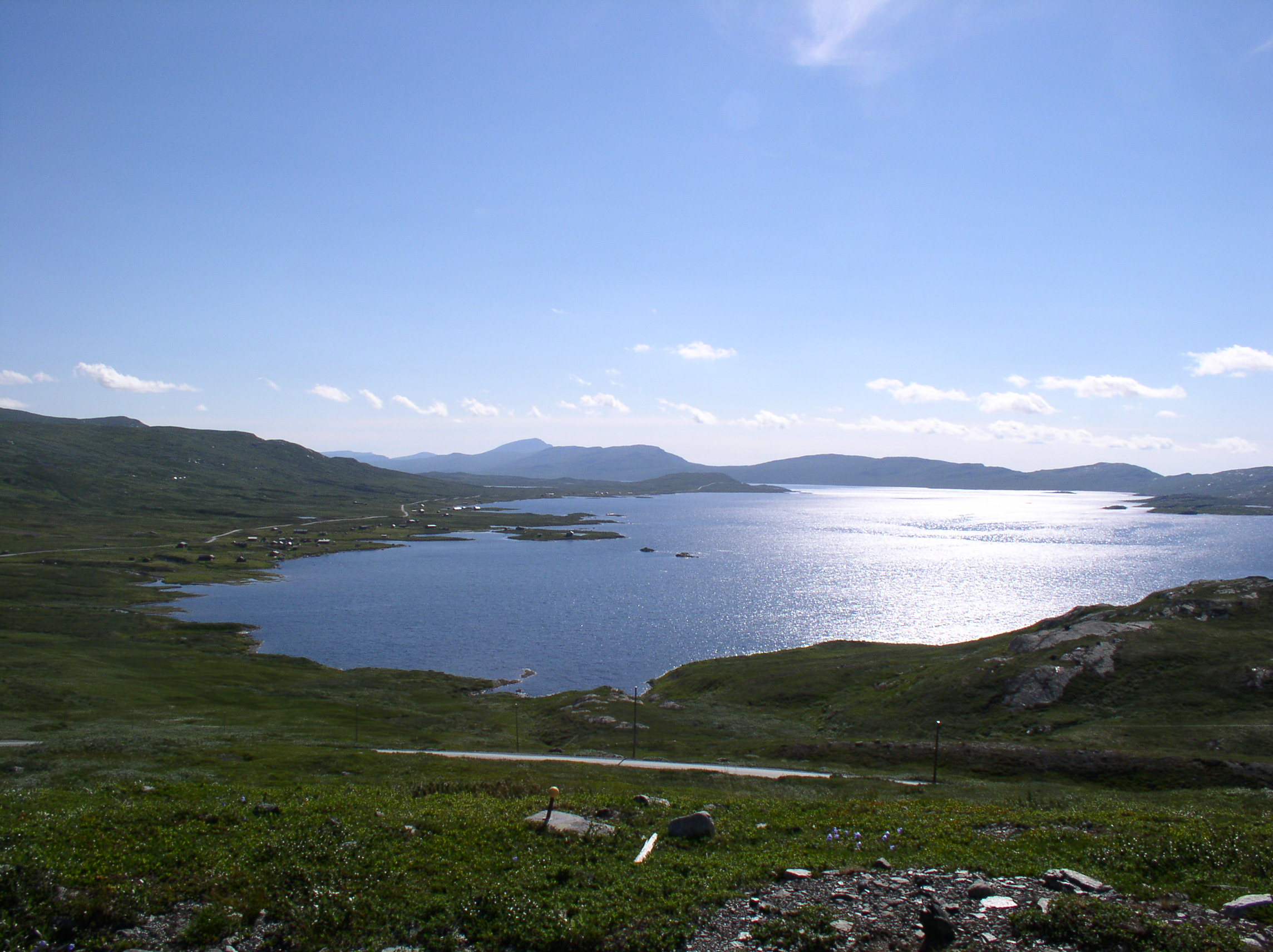 Vinstri-See in Norwegen (Oppland)